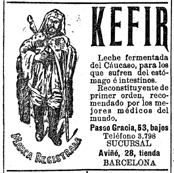 En aquest anunci podem observar un personatge i un text explicatiu dels avantatges terapèutics del quefir.